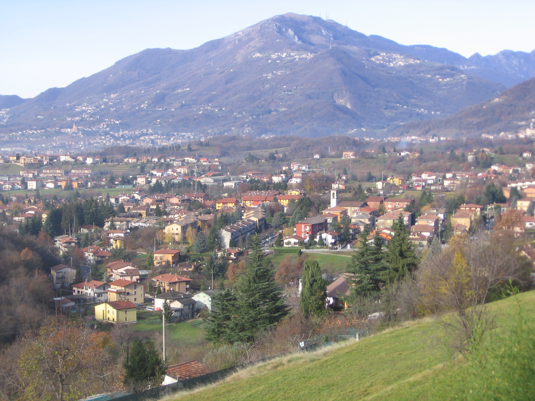 Ponteranica, Bergamo, Italy